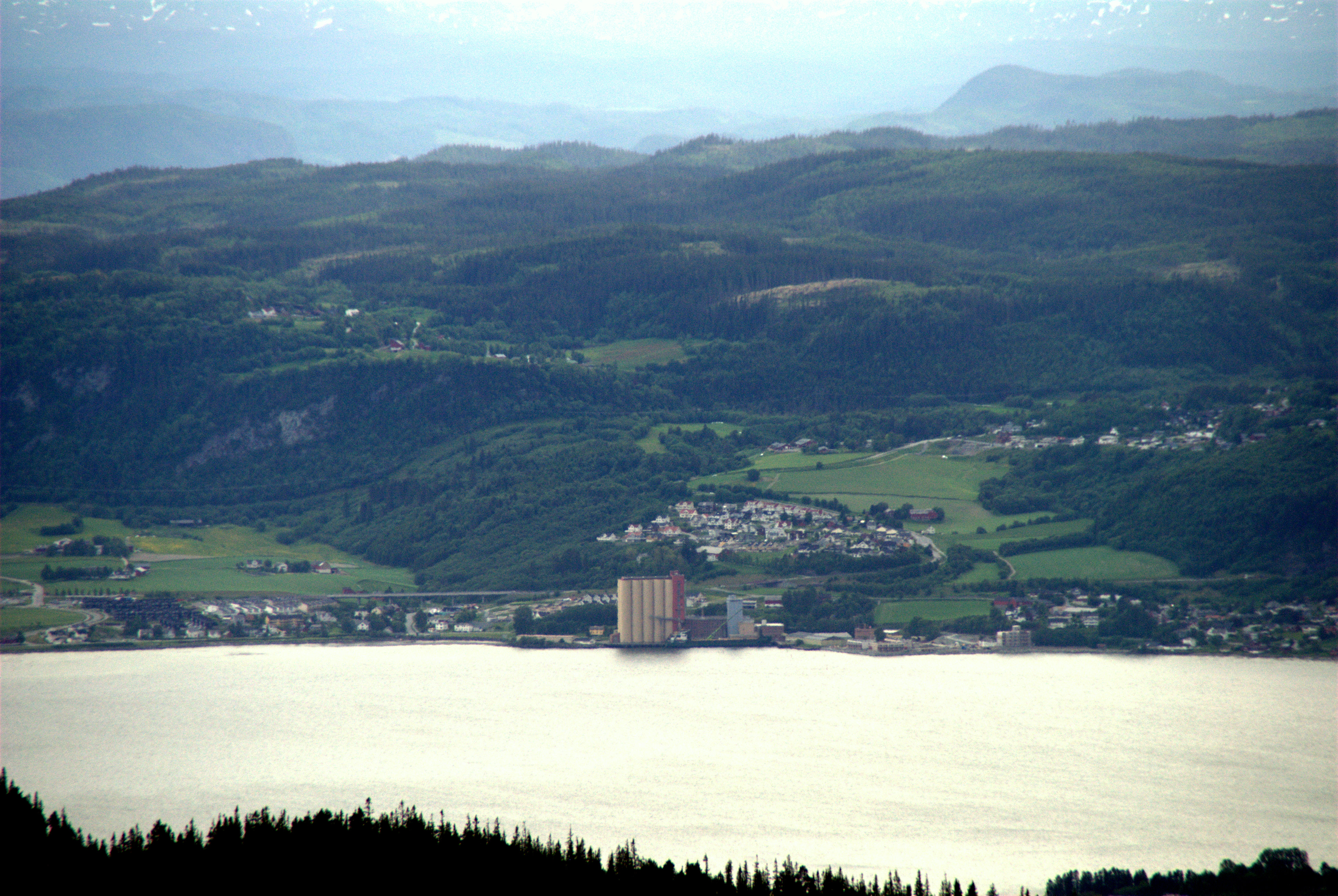 Buvika i Skaun og Gaulosen sett fra Storheia i Bymarka i Trondheim.